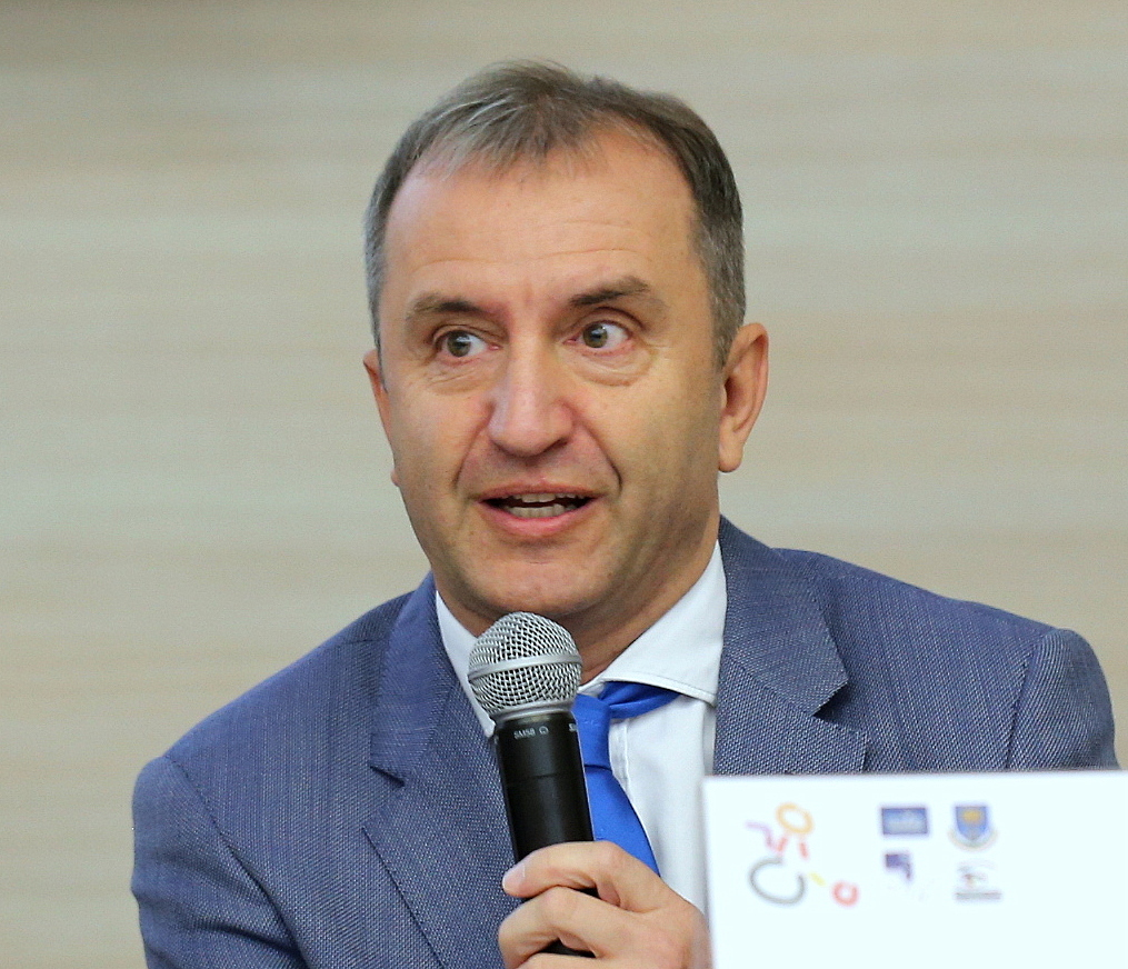 Szekeres Pál